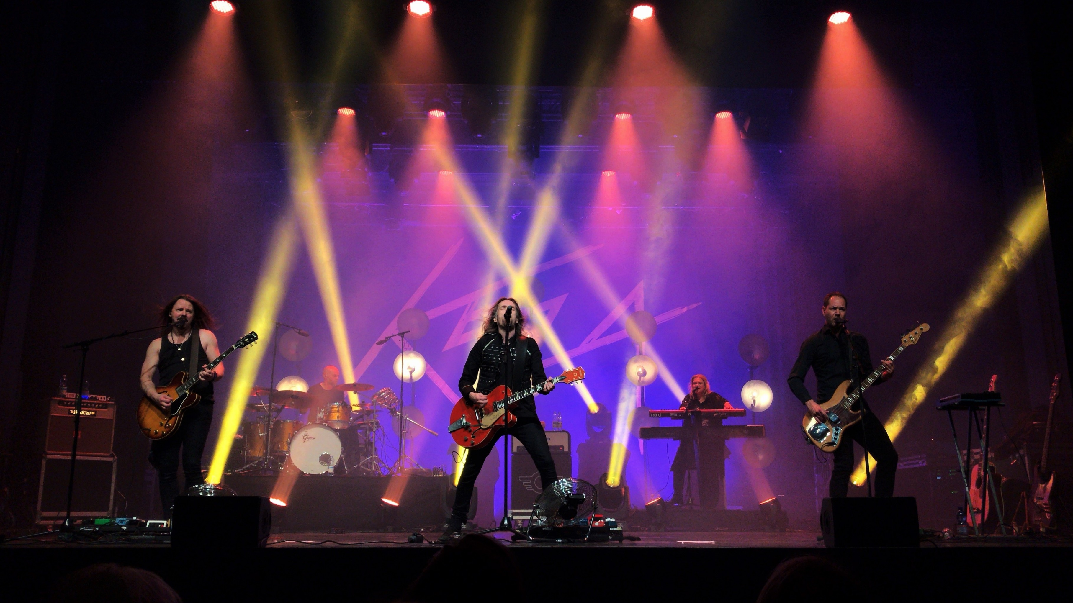 Anssi Kela esiintymässä Savoy-teatterissa 4. lokakuuta 2018